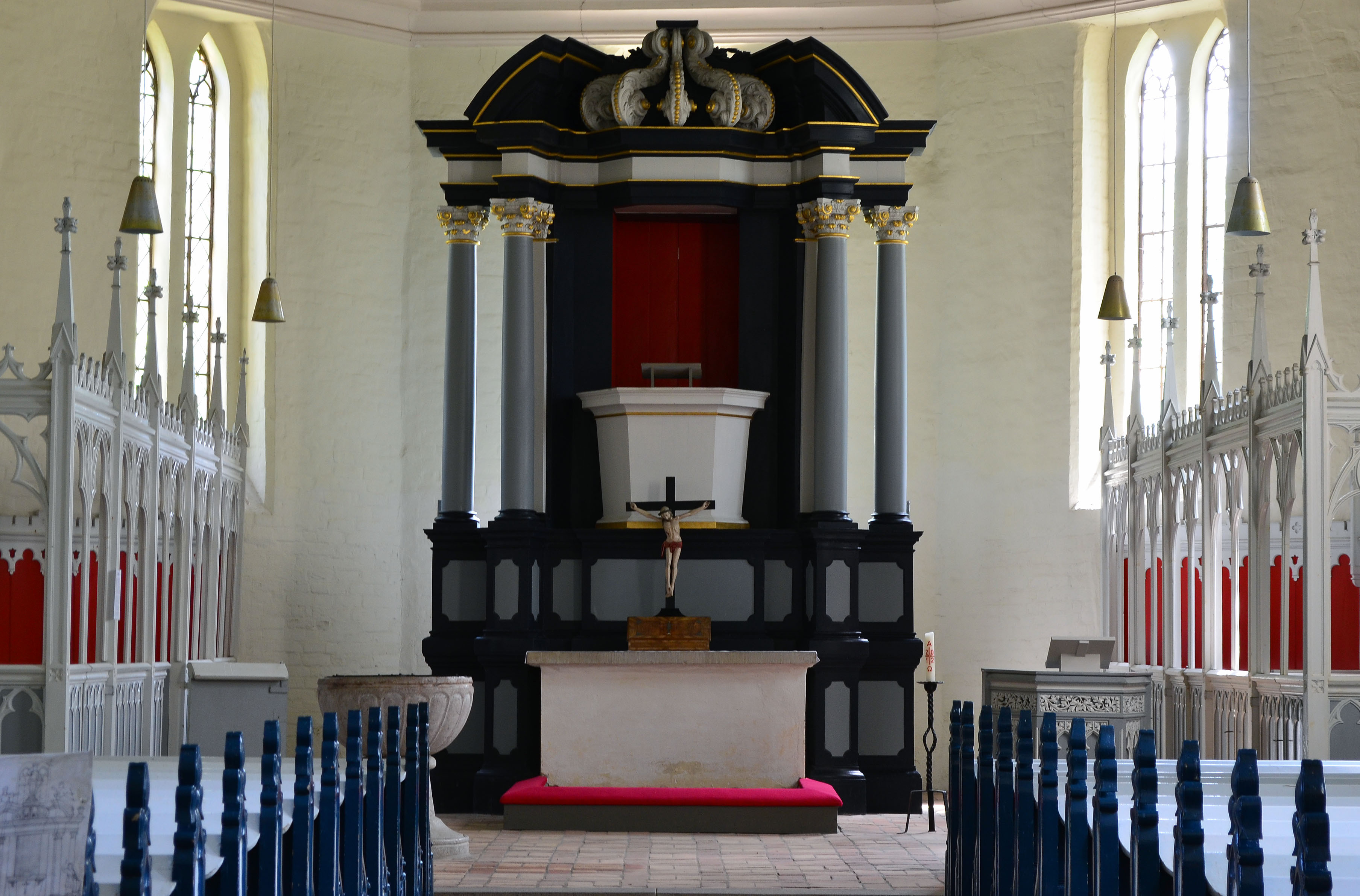 Damshagen, St. Thomas- Kirche, Blick durch das Kirchenschiff auf den Altar